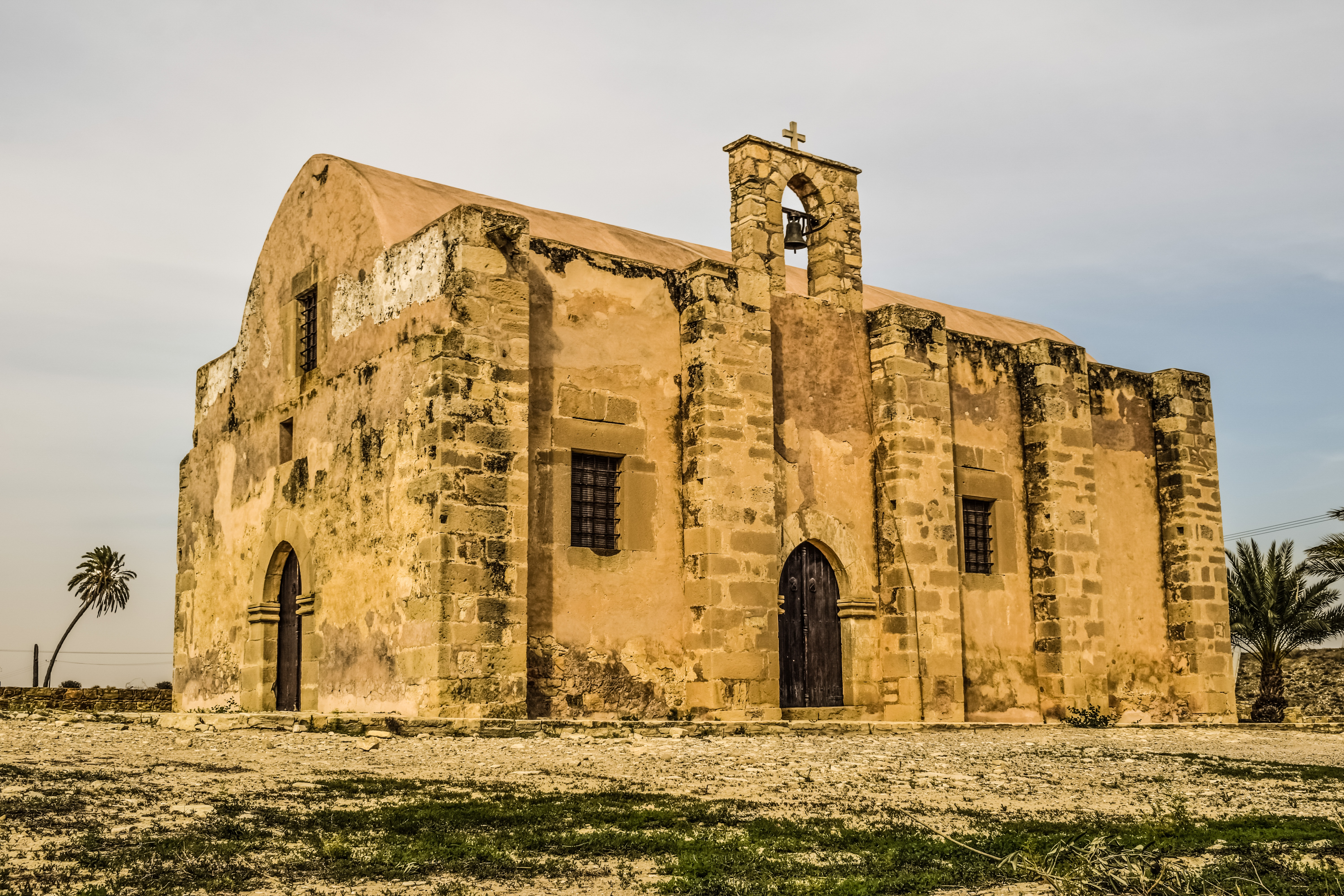 Chapel of Agios Georgios Arperas in Tersefanou